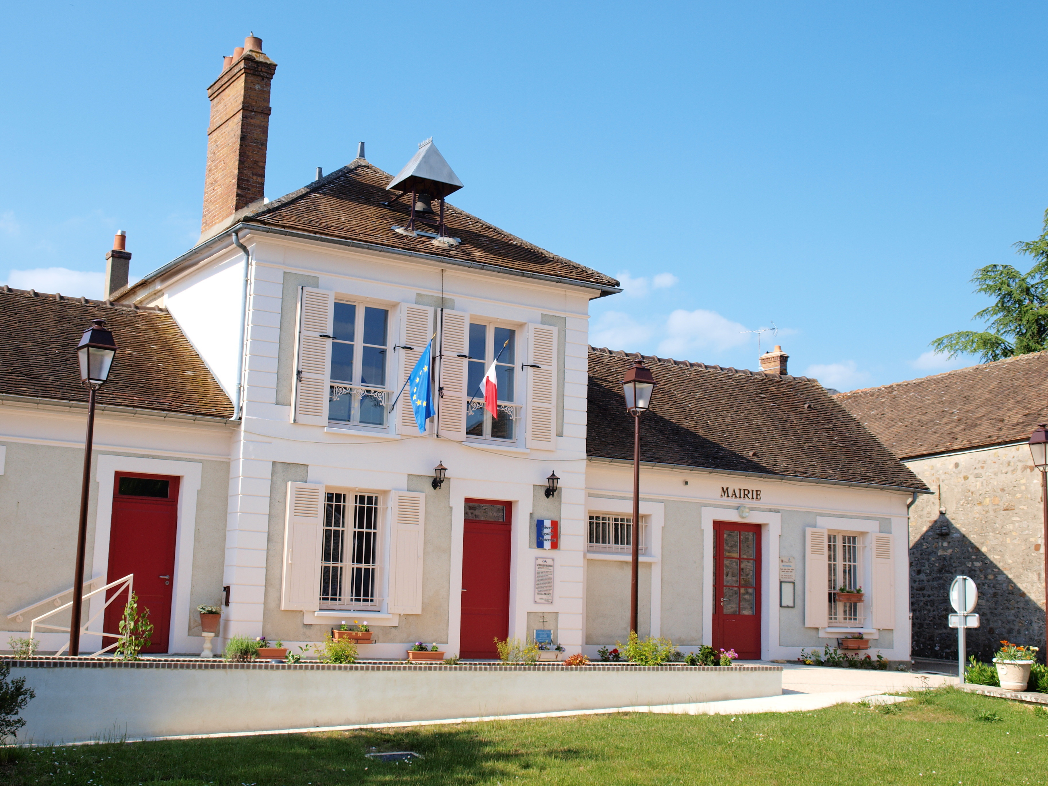 Montmachoux (Seine-et-Marne, France)